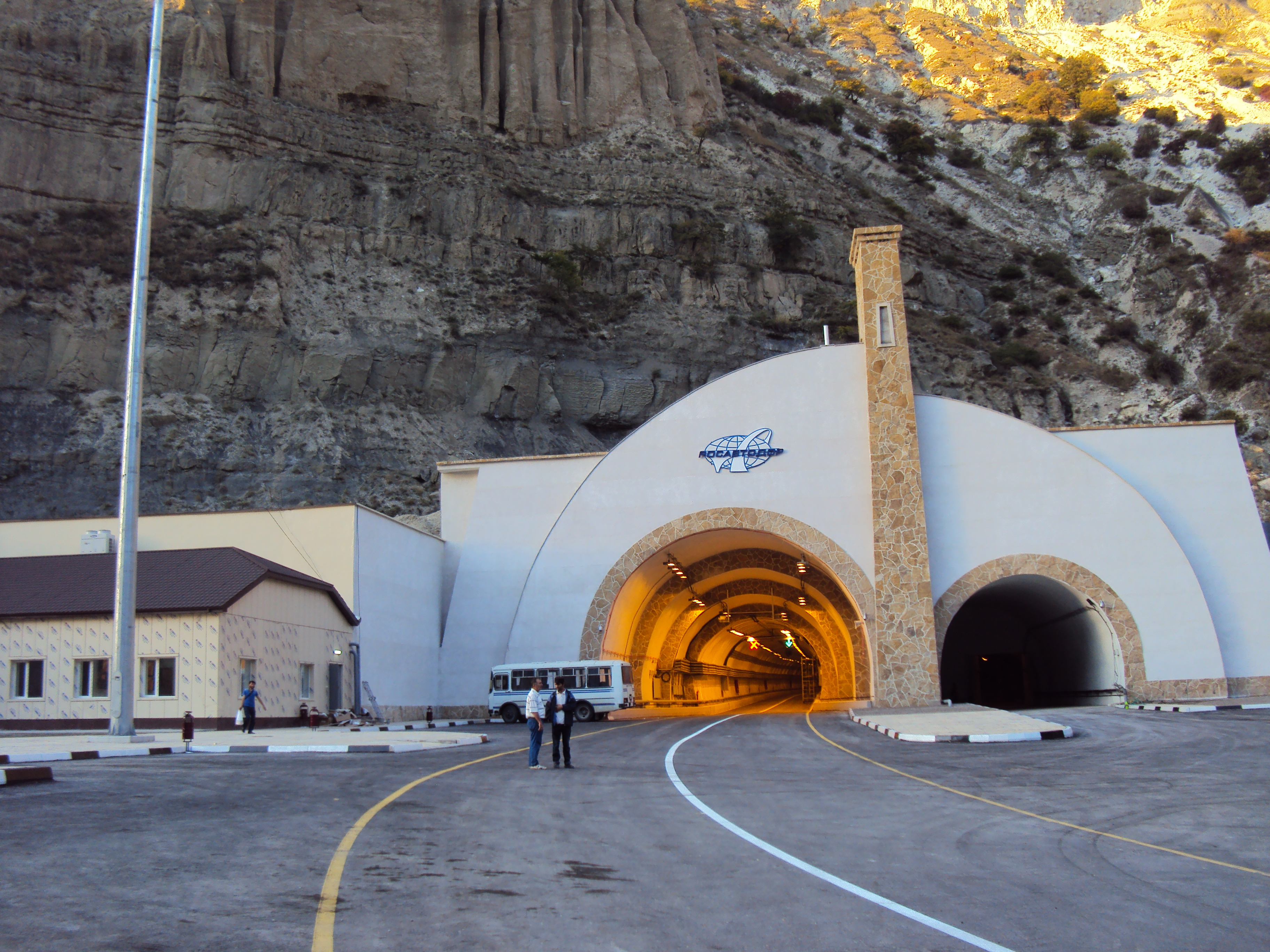 Гимринский а/д тоннель